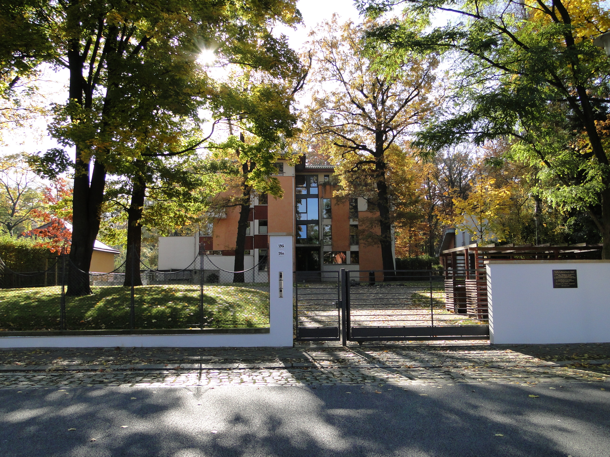 Heutiges Grundstück Goetheallee 26, früher Standort der Villa Fliederhof (Gedenktafel an der Mauer rechts)